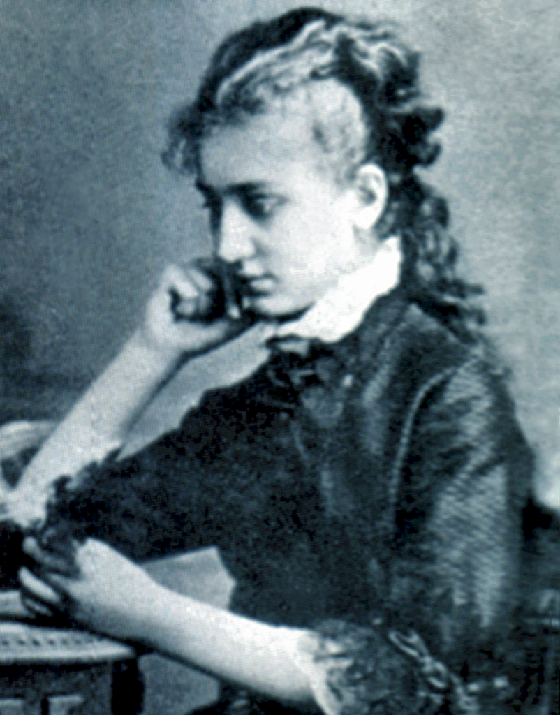 Maria Ciuntu um 1890, Gattin des Theodor Ritter von Flondor